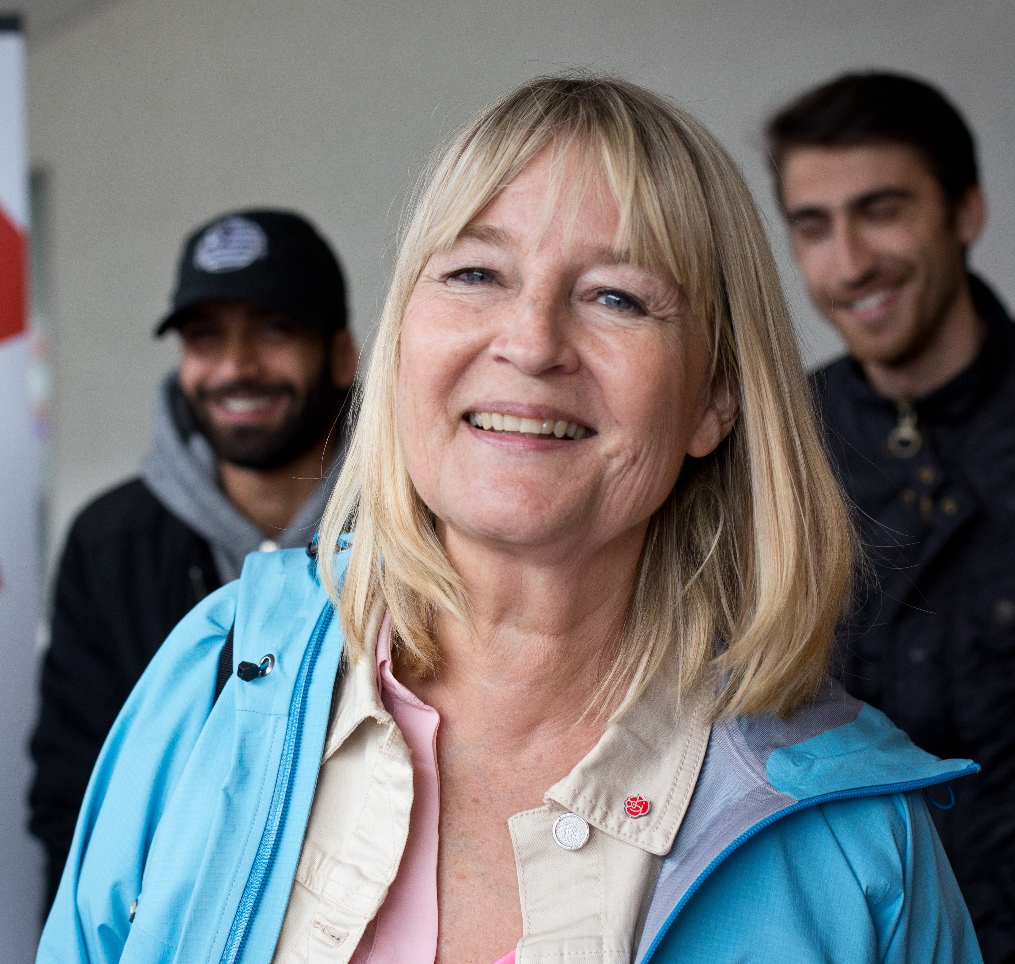 Marita Ulvskog förhandsröstar i EU-parlamentsvalet på Malmö högskola. Foto: Per Wilkens